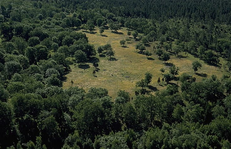 Spår av boskapsskötsel och åkerbruk. Motiv: Fjäle Nyckelord: Flygbilder, Riksintressen Kategori: Fossil åker Spår av boskapsskötsel och åkerbruk.